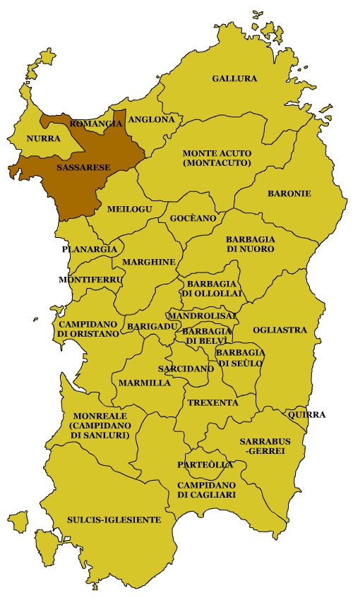 Sardinian Subregions